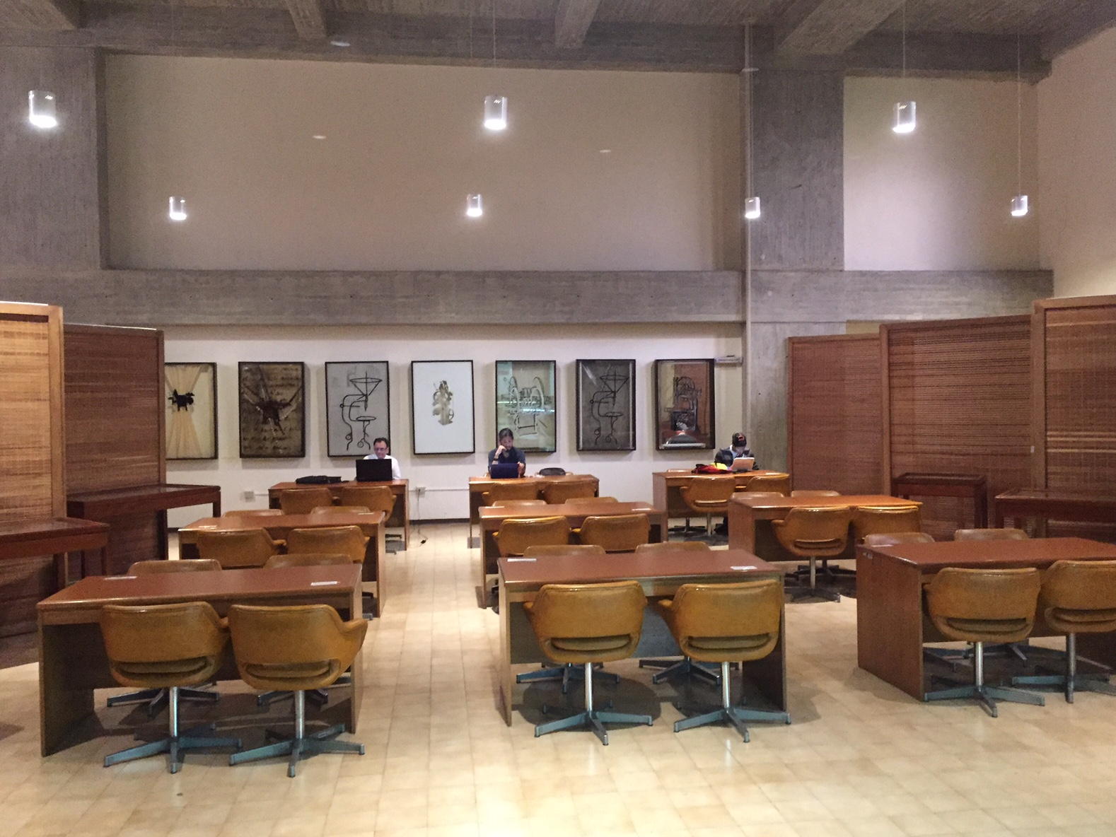 Sala Isaac J. Pardo del CELARG.